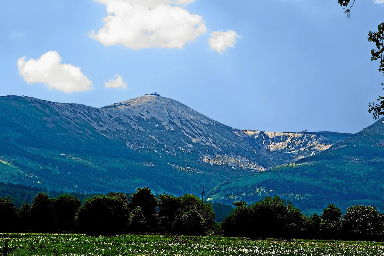 Wiosenny widok na Śnieżkę, Kocioł Łomniczki z drogi z Kowar do Karpacza.